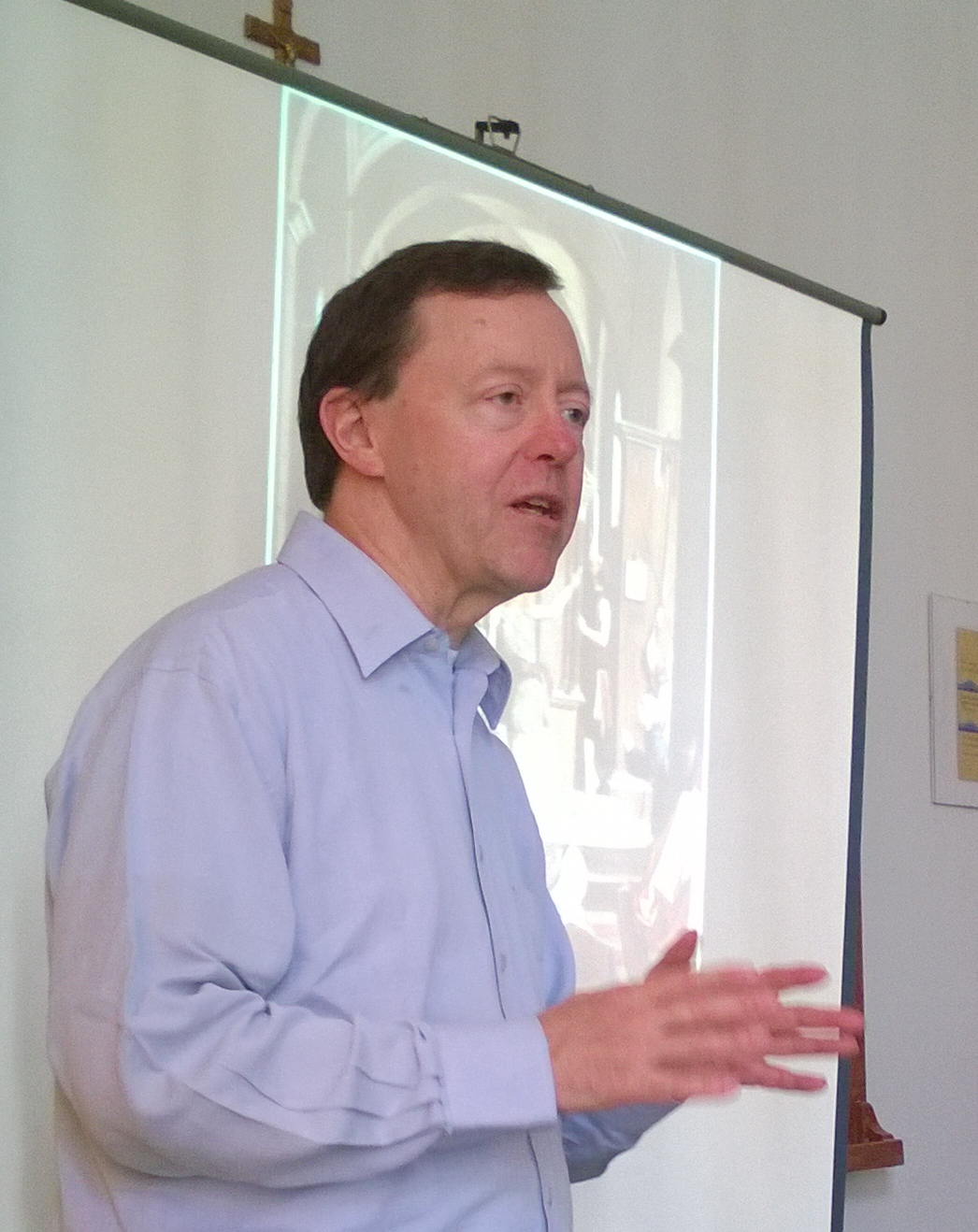 Robert Godding (* 1956), belgický historik a hagiograf - bollandista.[1] Bruxelles, Saint-Michel, 2014.